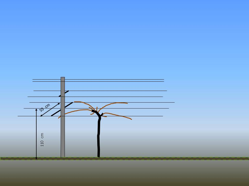 Hochkultur mit Kronenschnitt